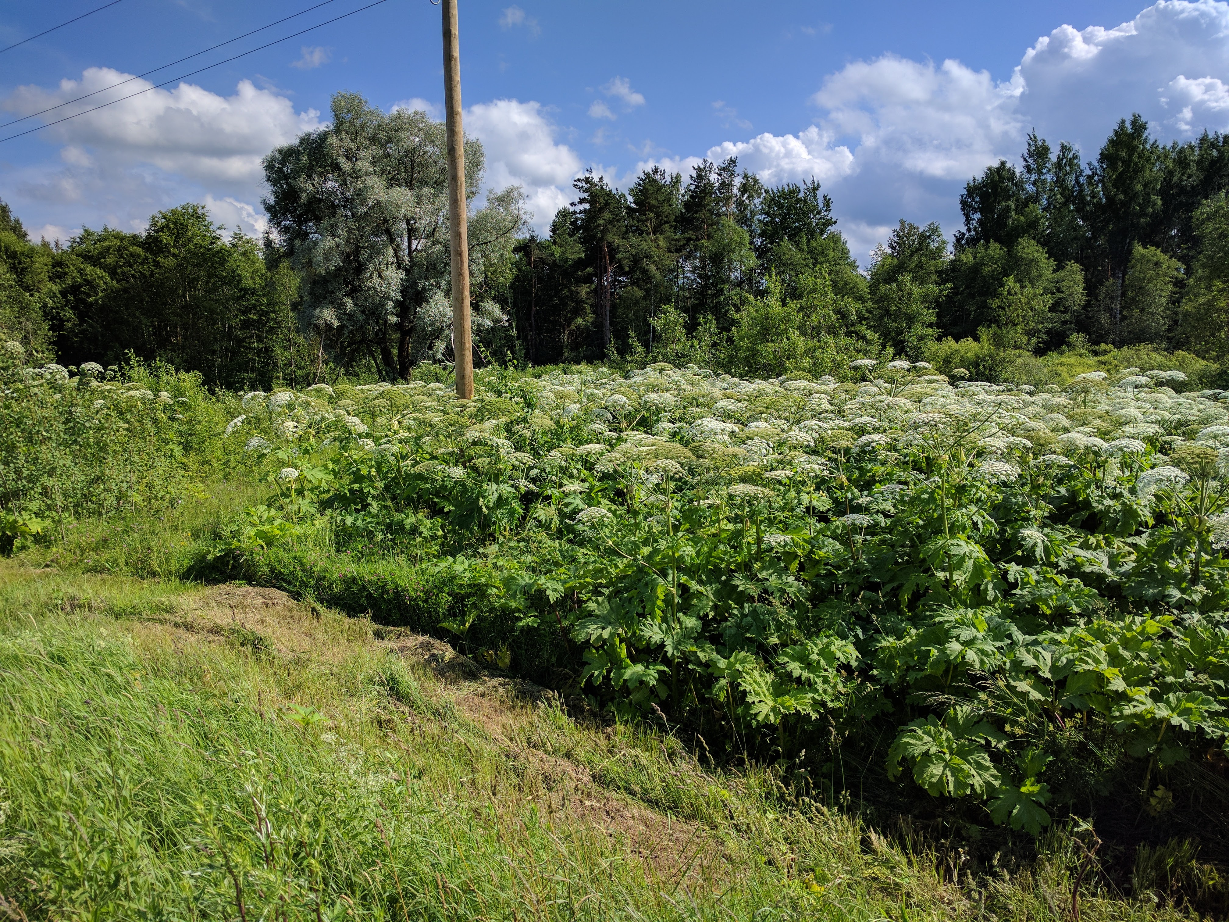 zagon barszczu Sosnowskiego przy drodze na Łotwie